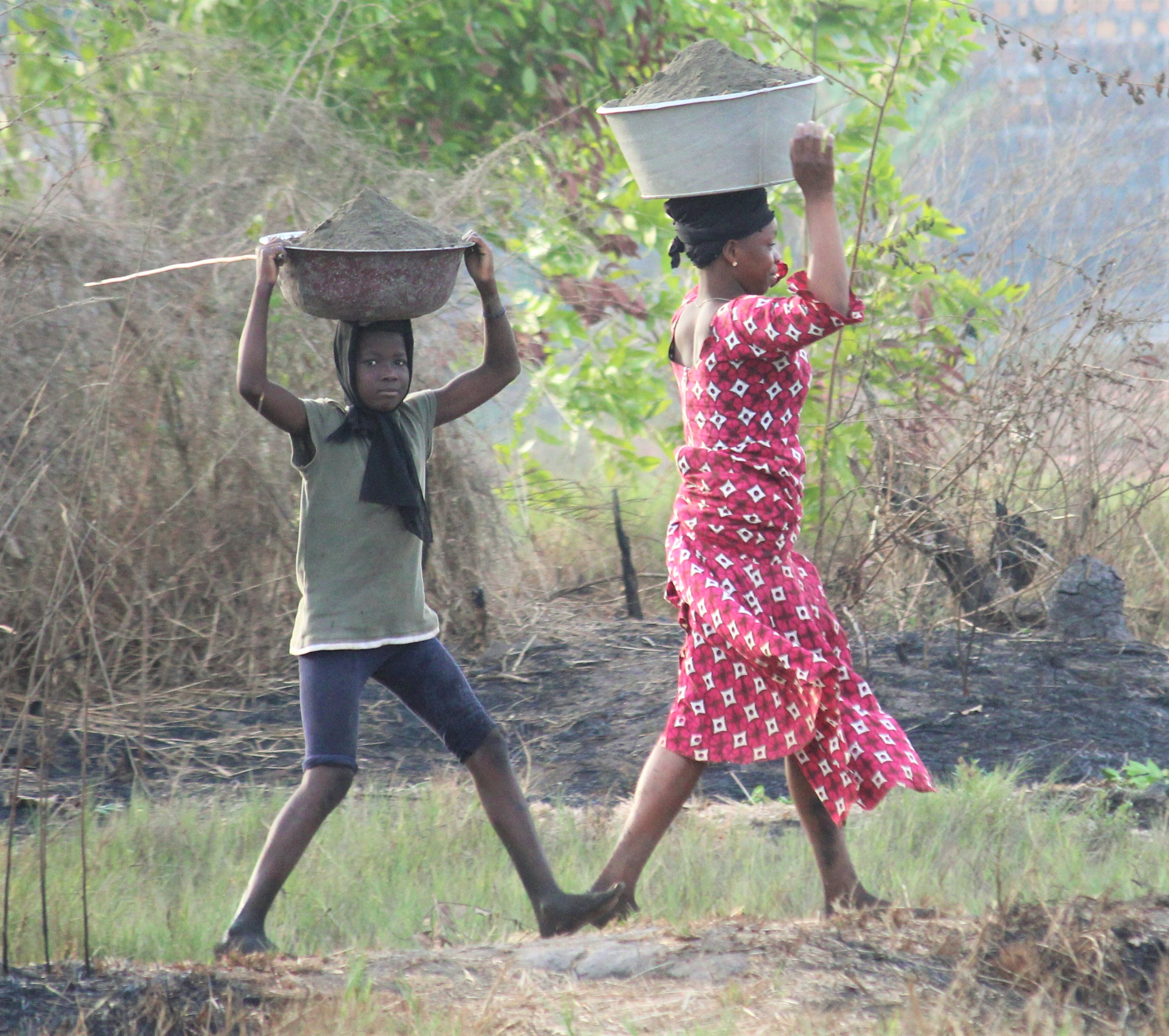 Kamsar This is an image with the theme "Africa on the Move or Transport" from: Guinea